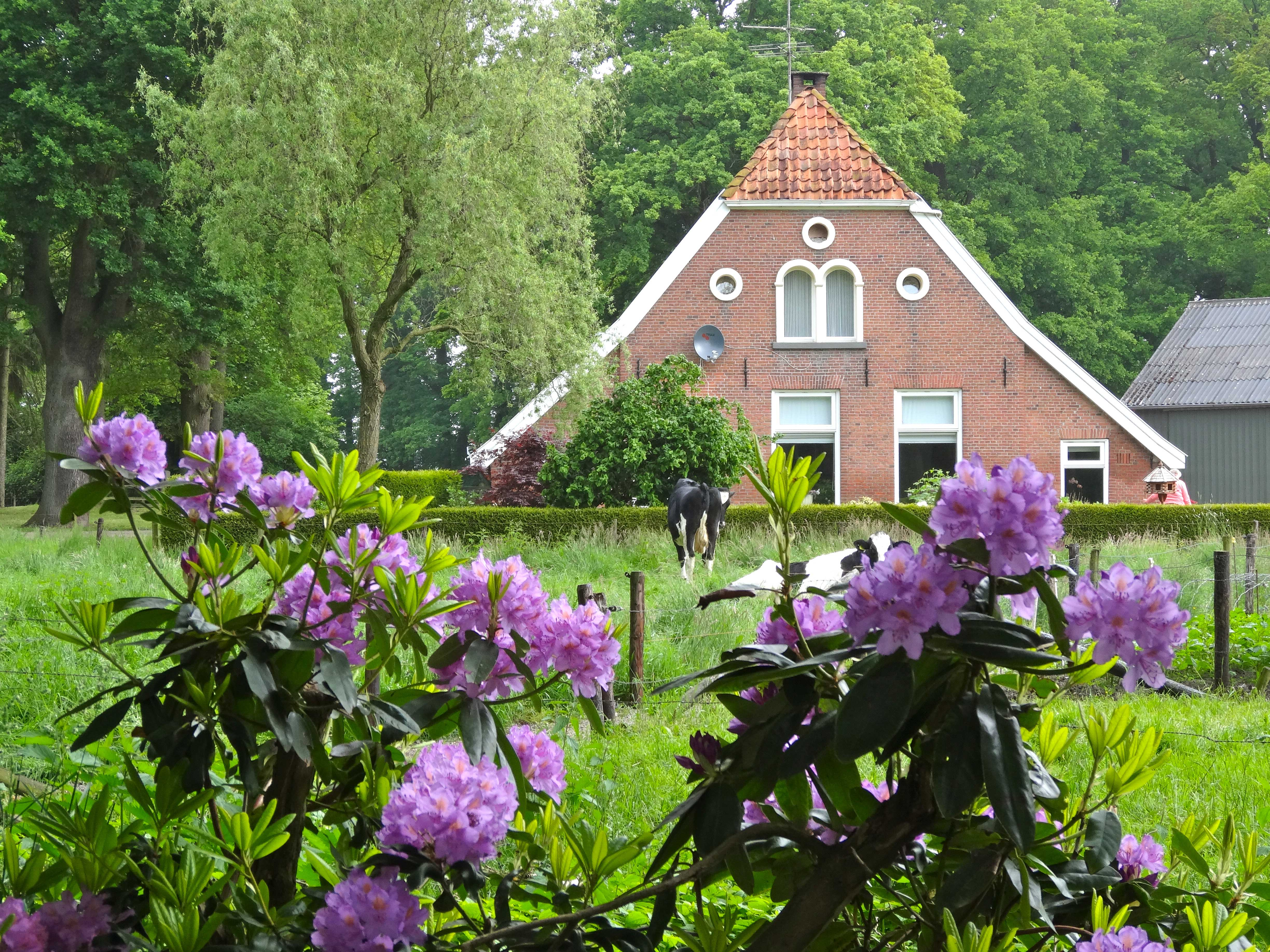 Boerderij aan de Haermansweg in de Boerskotten in De Lutte